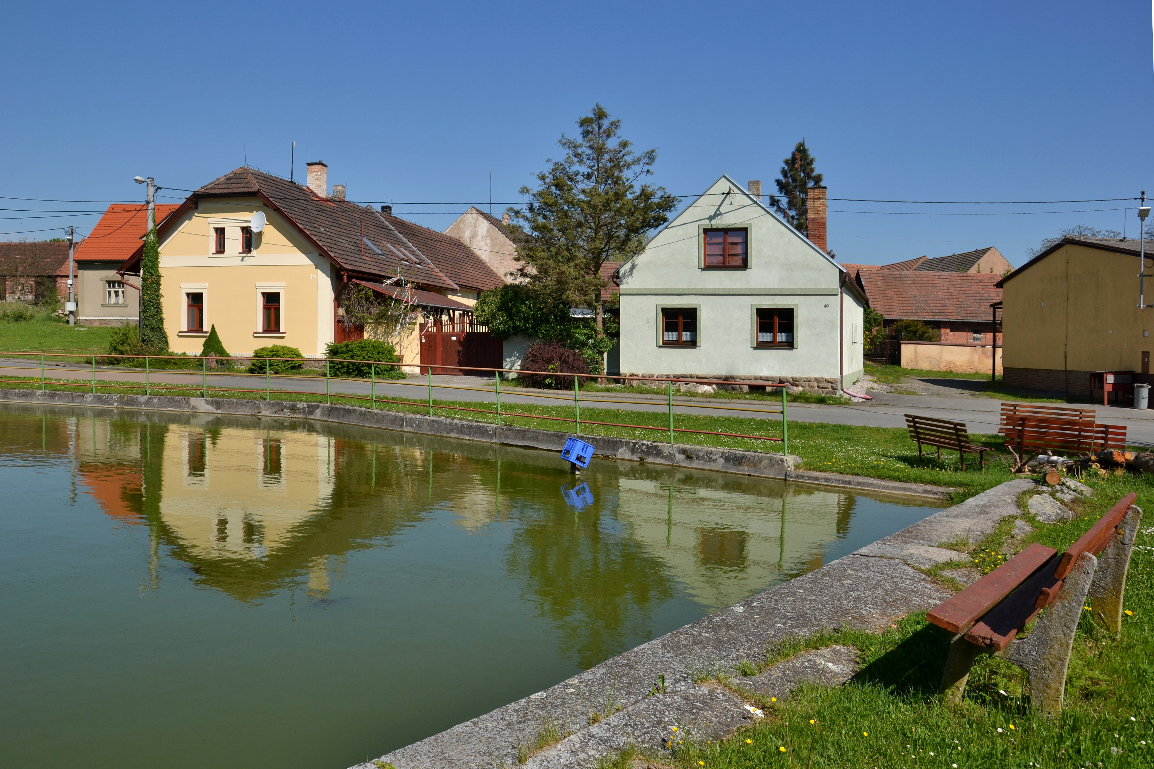 Bílov – domy na severním okraji návsi